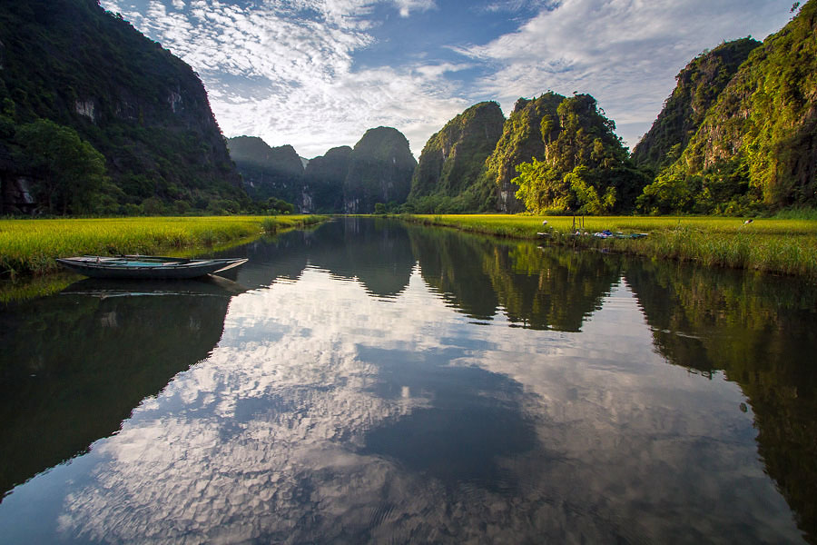 Tam Cốc - Ninh Bình